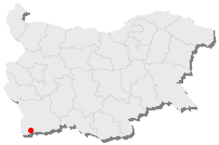 Словѣньскъ / ⰔⰎⰑⰂⰡⰐⰠⰔⰍⰟ: Сътворєно основѣ ⁖ :de:Datei:Sofia in BG.png ⁖ ѥстъ ⁙ прьвоначальнъ творьць :de:Benutzer:HeRoLE ѥстъ